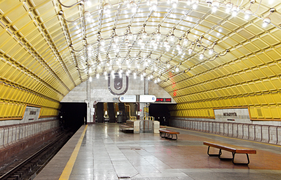 Станция Металлургов Днепропетровского метрополитена.